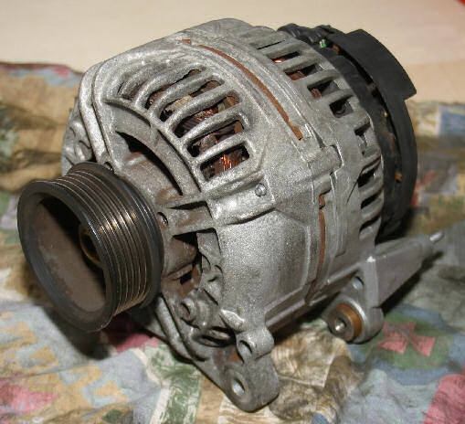 Lichtmaschine (VW T4, Bj. 2001, 120A) mit 1,7kW Leistung.